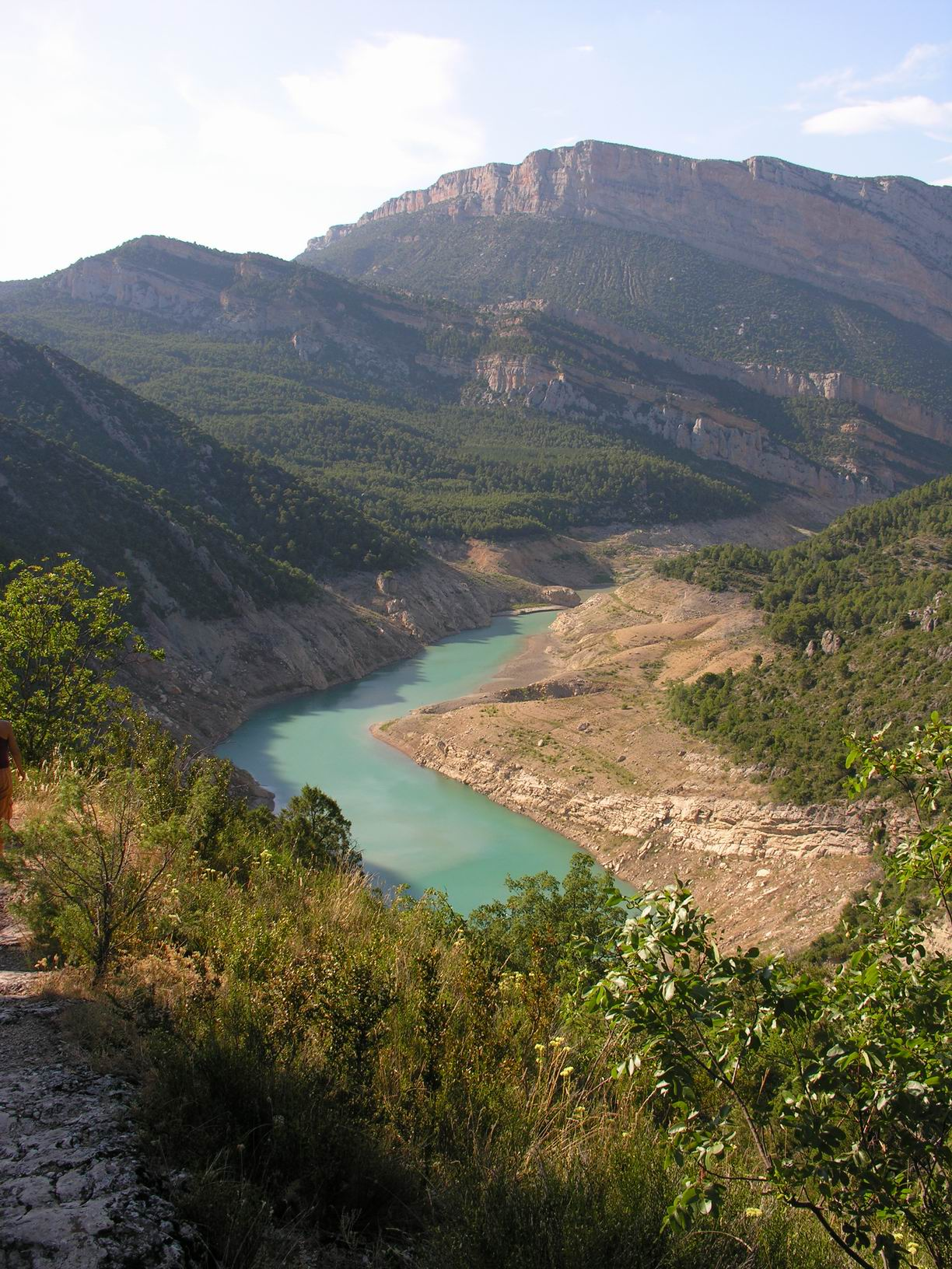 Embassament de Canelles - Tristesa